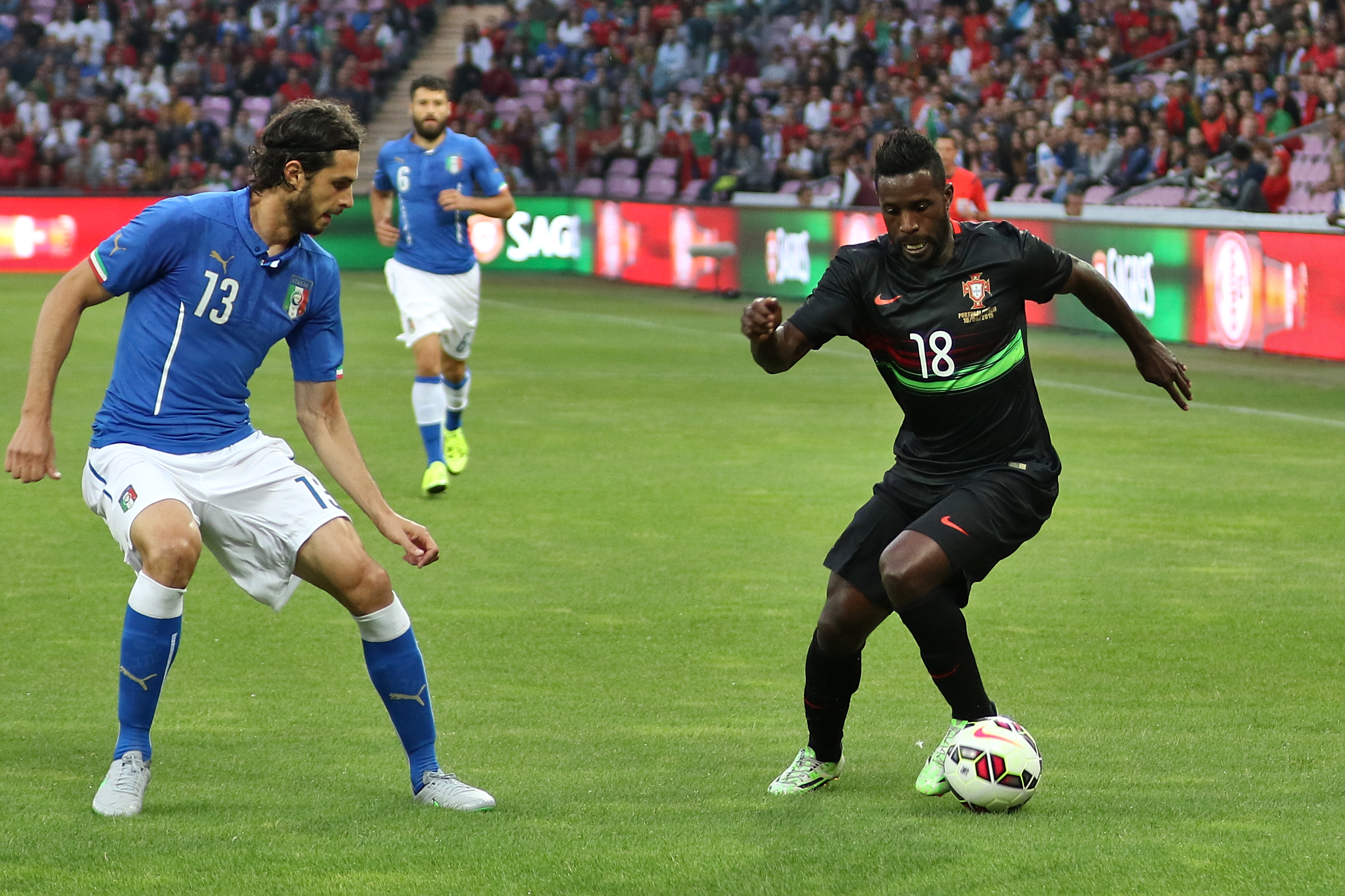 20150616 - Portugal - Italie - Genève - Andra Ranocchia et Silvestre Varela